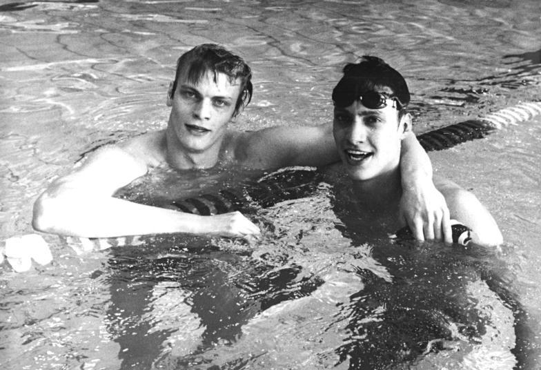 Sven Lodziewski, Jörg Woithe ADN-ZB Kluge 15.6.83 Gera: 34. DDR-Meisterschaften im Sportschwimmen- Mit dem neuen Europarekord von 1:49,30 min wurde Sven lodziewski (r., SC Dynamo Berlin) DDR-Meister über 200m Freistil vor seinem Klubkameraden Jörg Woithe 8l.), der 1:49,60 min schwamm.